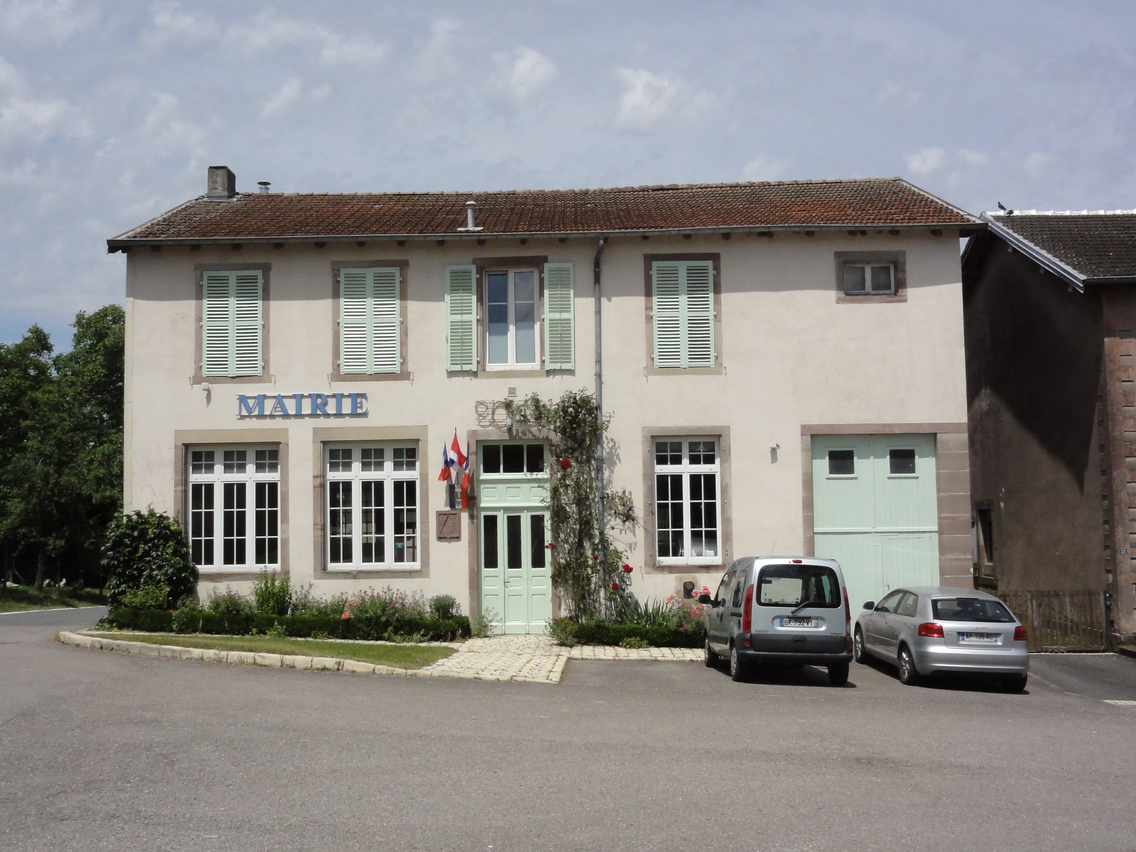 Montreux (M-et-M) mairie